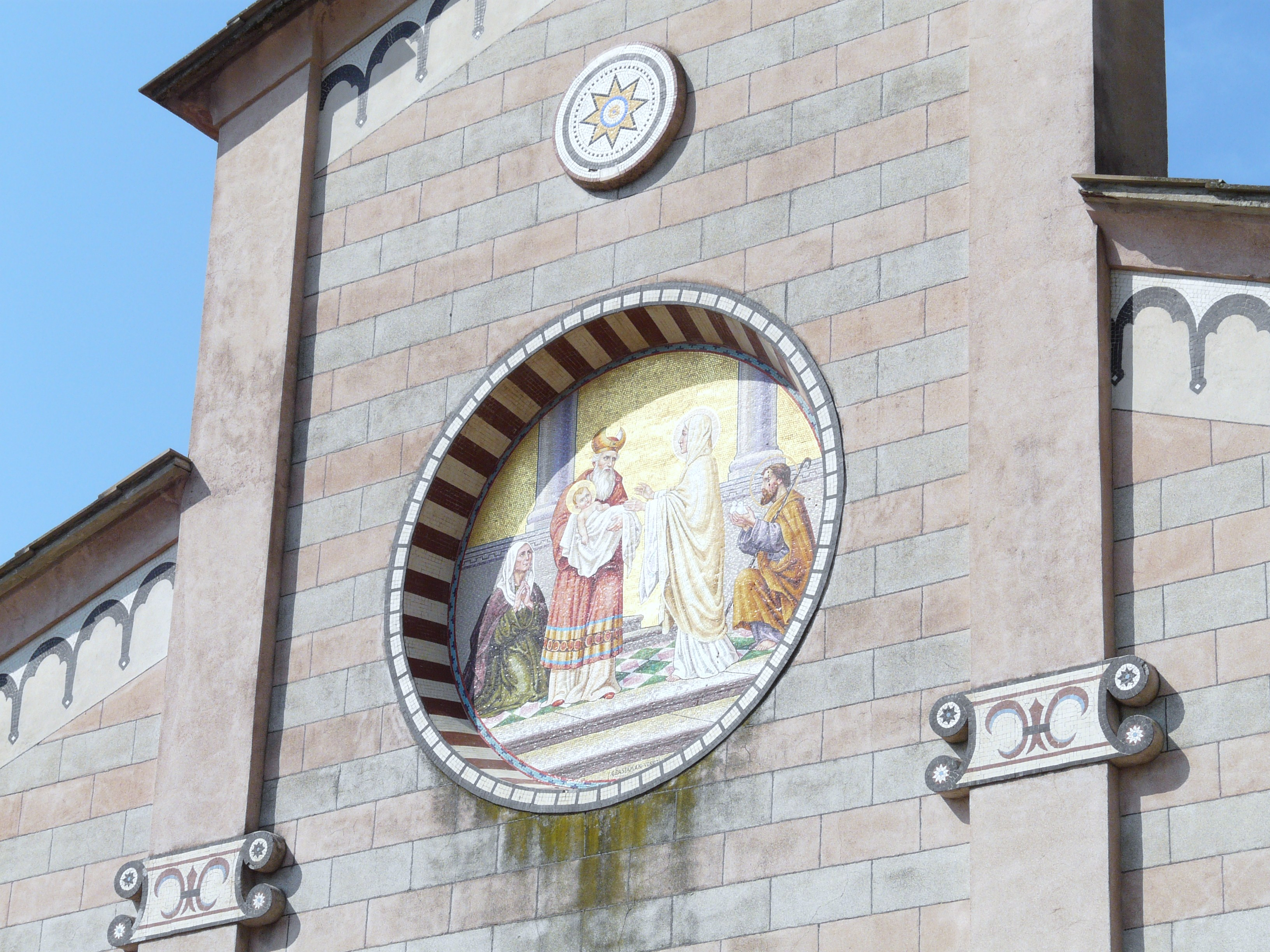 Chiesa della Purificazione di Maria, Apricale, Liguria, Italia